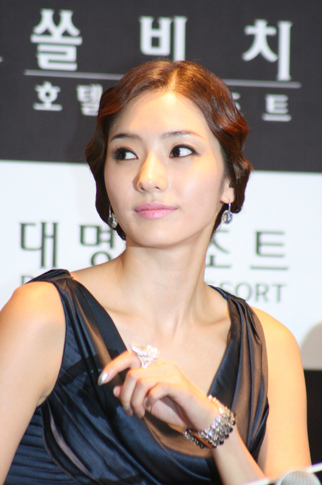 사진 052